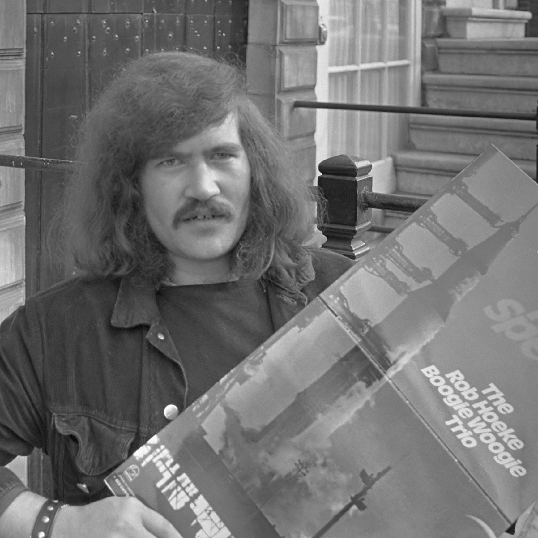 Rob Hoeke (links) kreeg Gouden Tulp 21 september 1972